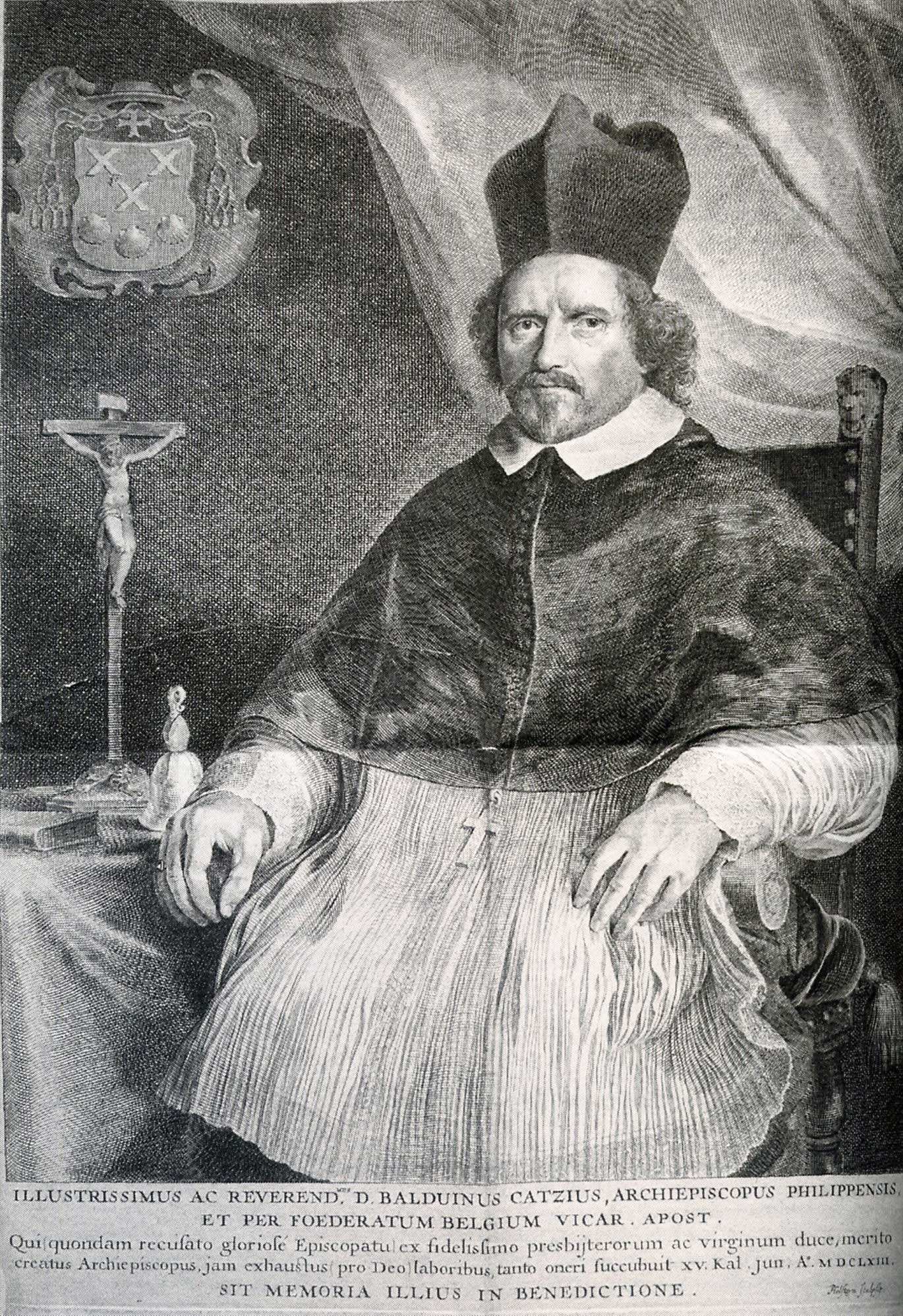 portret van Boudewijn (ook Balduinus) Cats (circa 1603-1663)